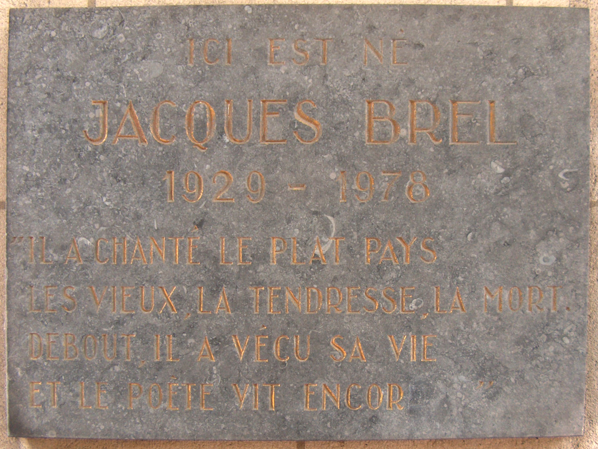 L'avenue du Diamant n°138 (Jacques Brel) à Schaerbeek, Bruxelles, Belgique.